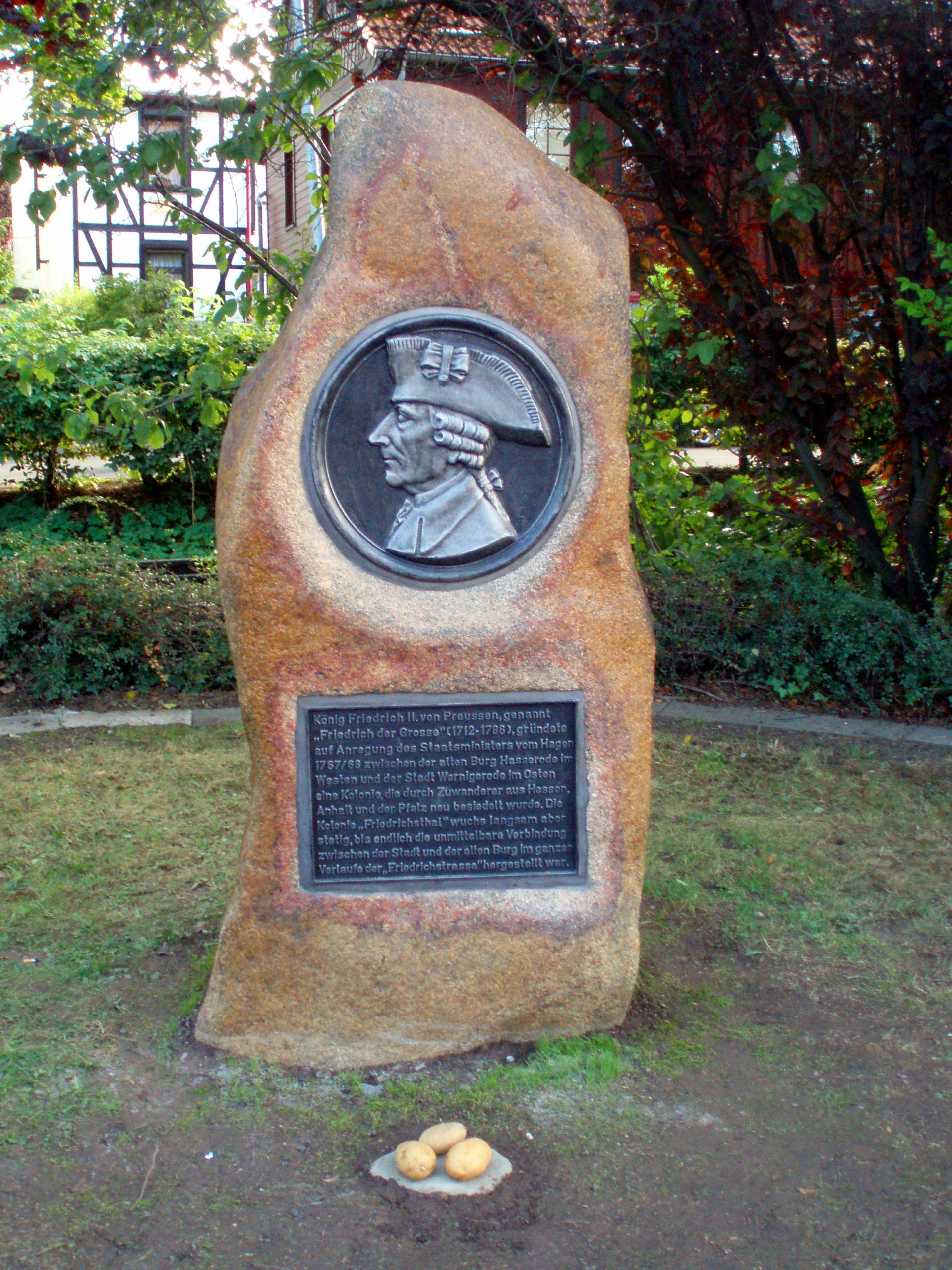 Denkmal Friedrich II. in Hasserode